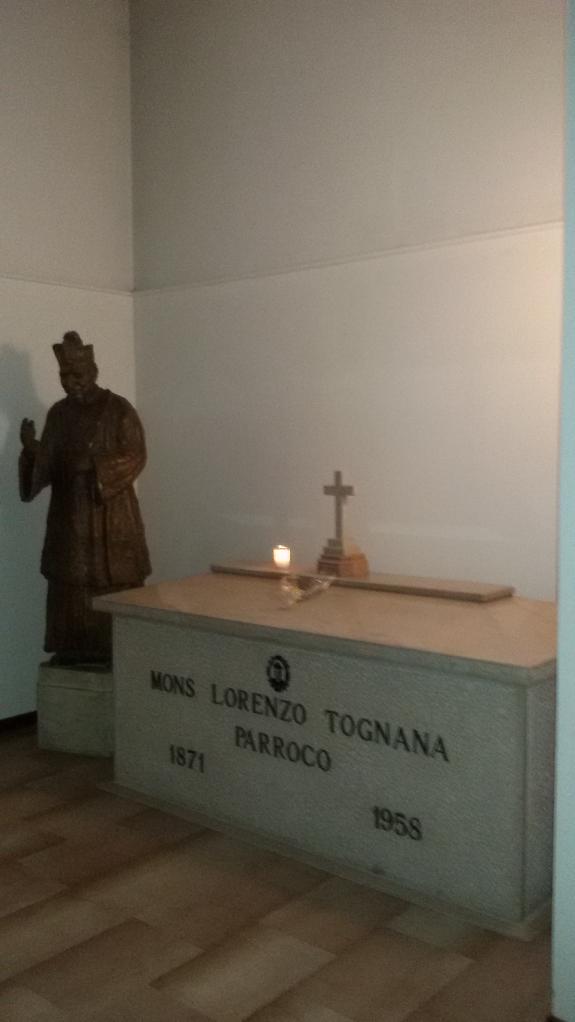 Chiesa di Santa Cristina Quinto di Treviso